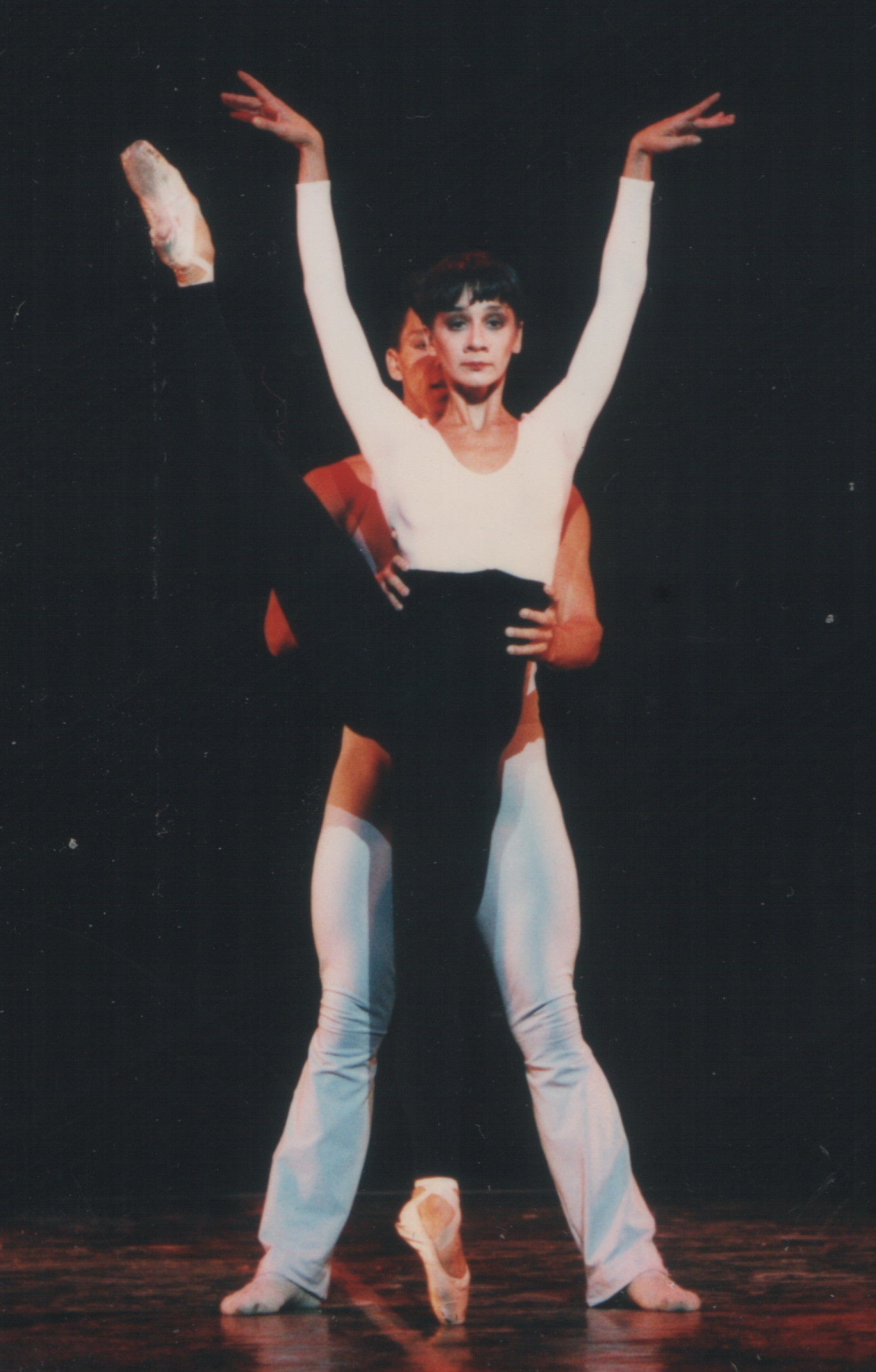 Francesca Sposi et Lienz Chang sont les interprètes principaux des Six danses de Chabrier de Roland Petit à Marseille (1995).